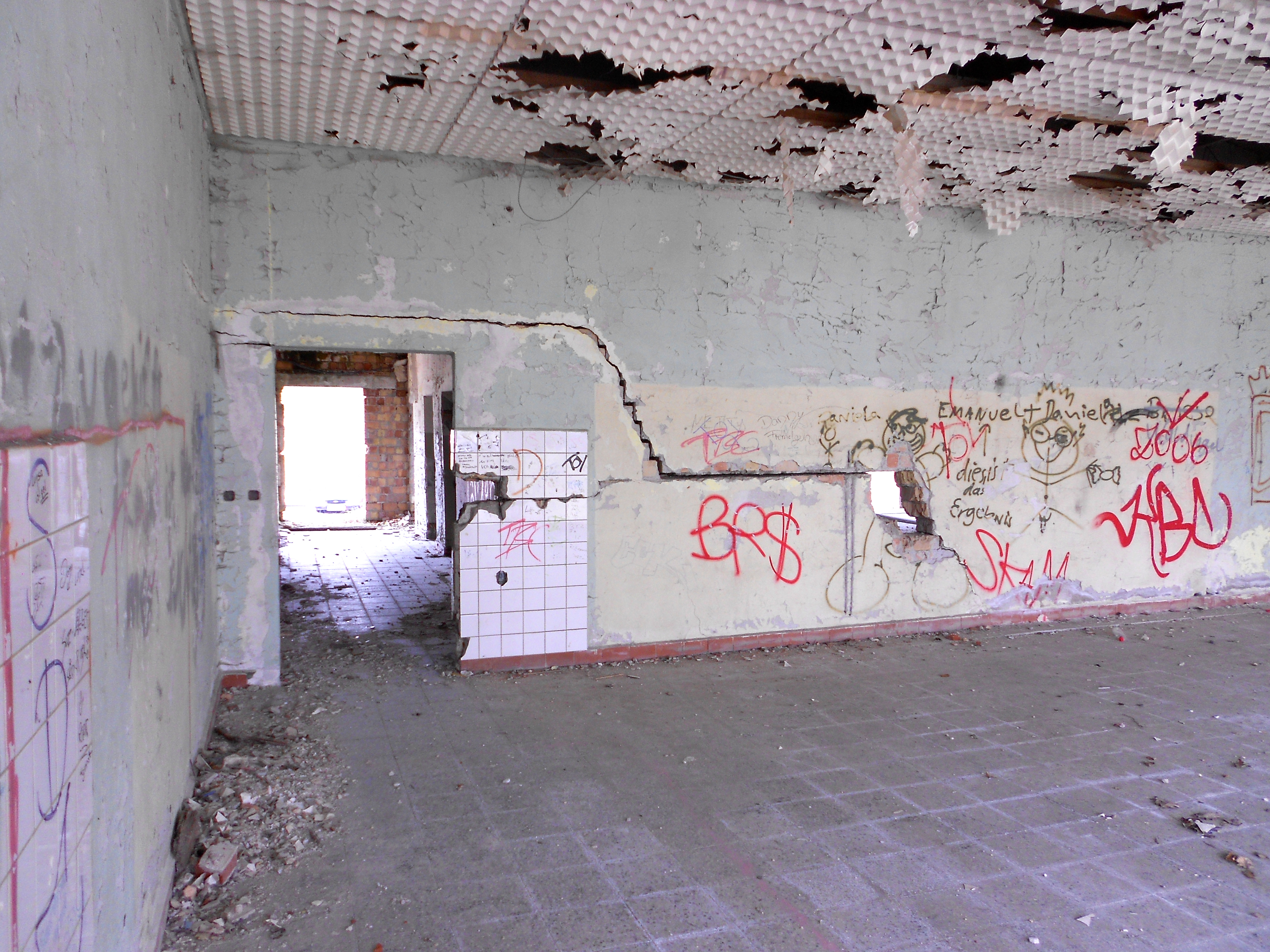 Eberswalde Südend, ehemalige Artilleriekaserne (bis 1945), sowjetische Kaserne (bis 1994), heute Landeskriminalamt, Finanzamt und andere Behörden